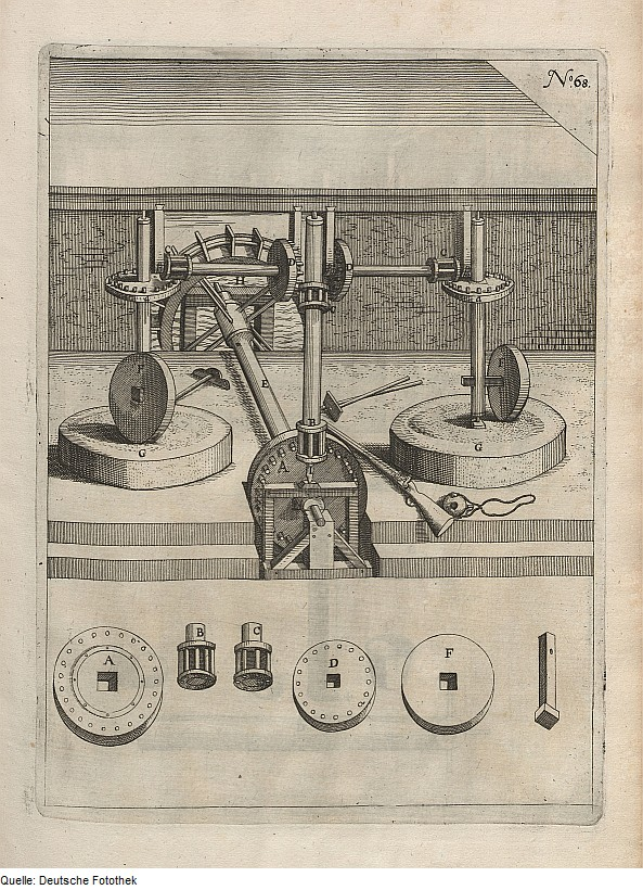 Original image description from the Deutsche Fotothek Mechanik & Mühle & Pulvermühle & Wassermühle & Wasserrad